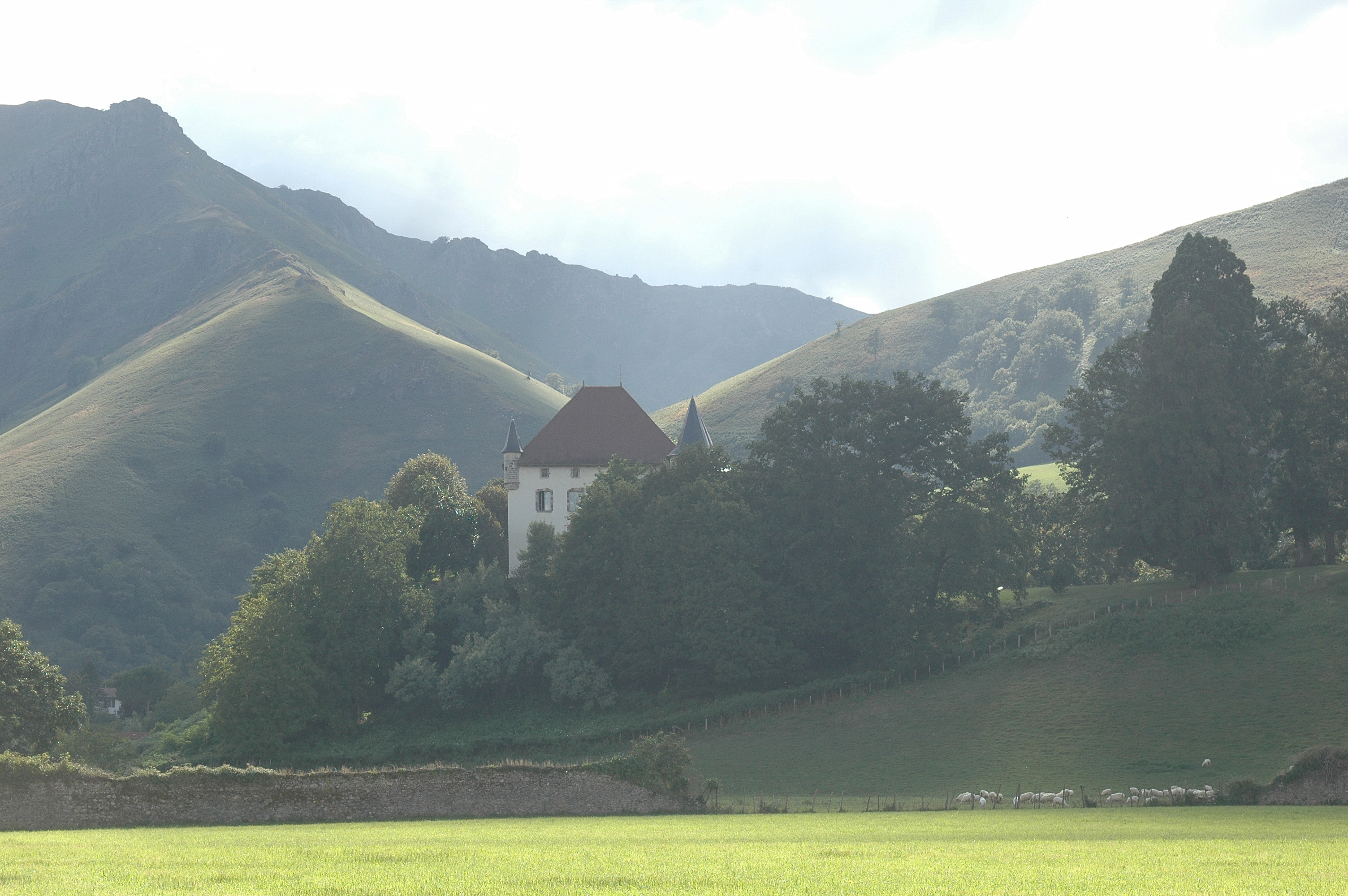 Saint-Étienne-de-Baïgorry, château d'Etxauz (XVIème siècle). Photo prise le 03/08/06 par Harrieta171